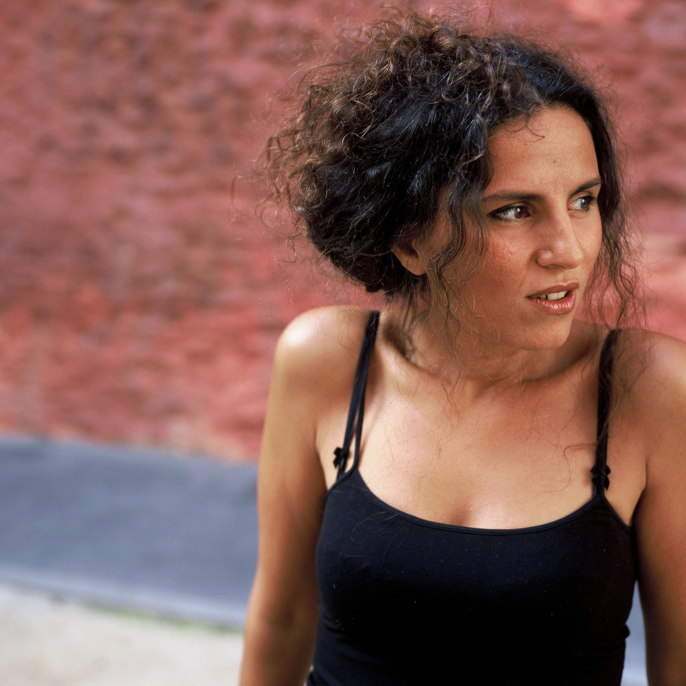 Racha Arodaky, pianiste.